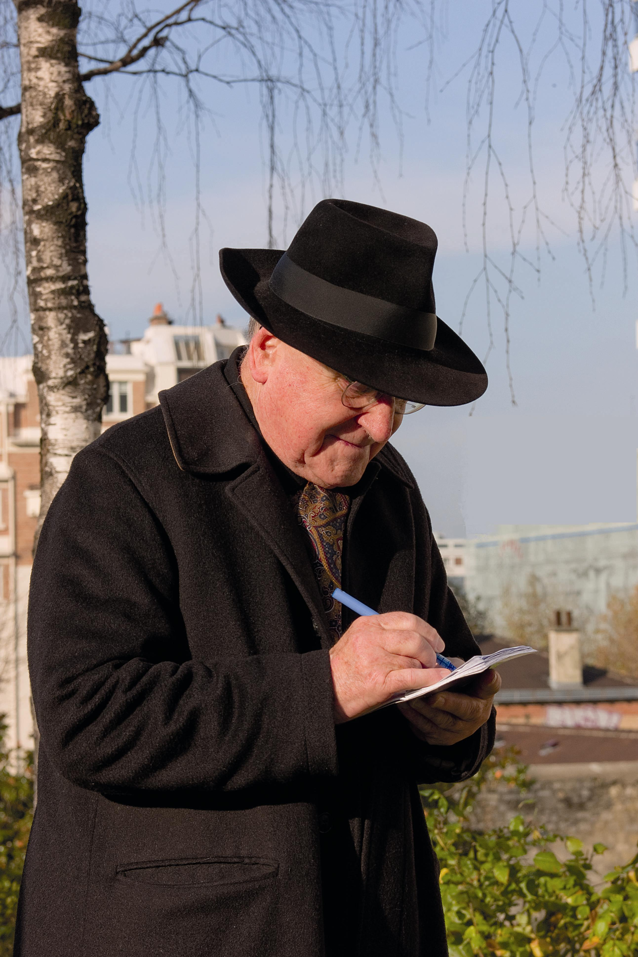 Portrait du poète français Robert Marteau.